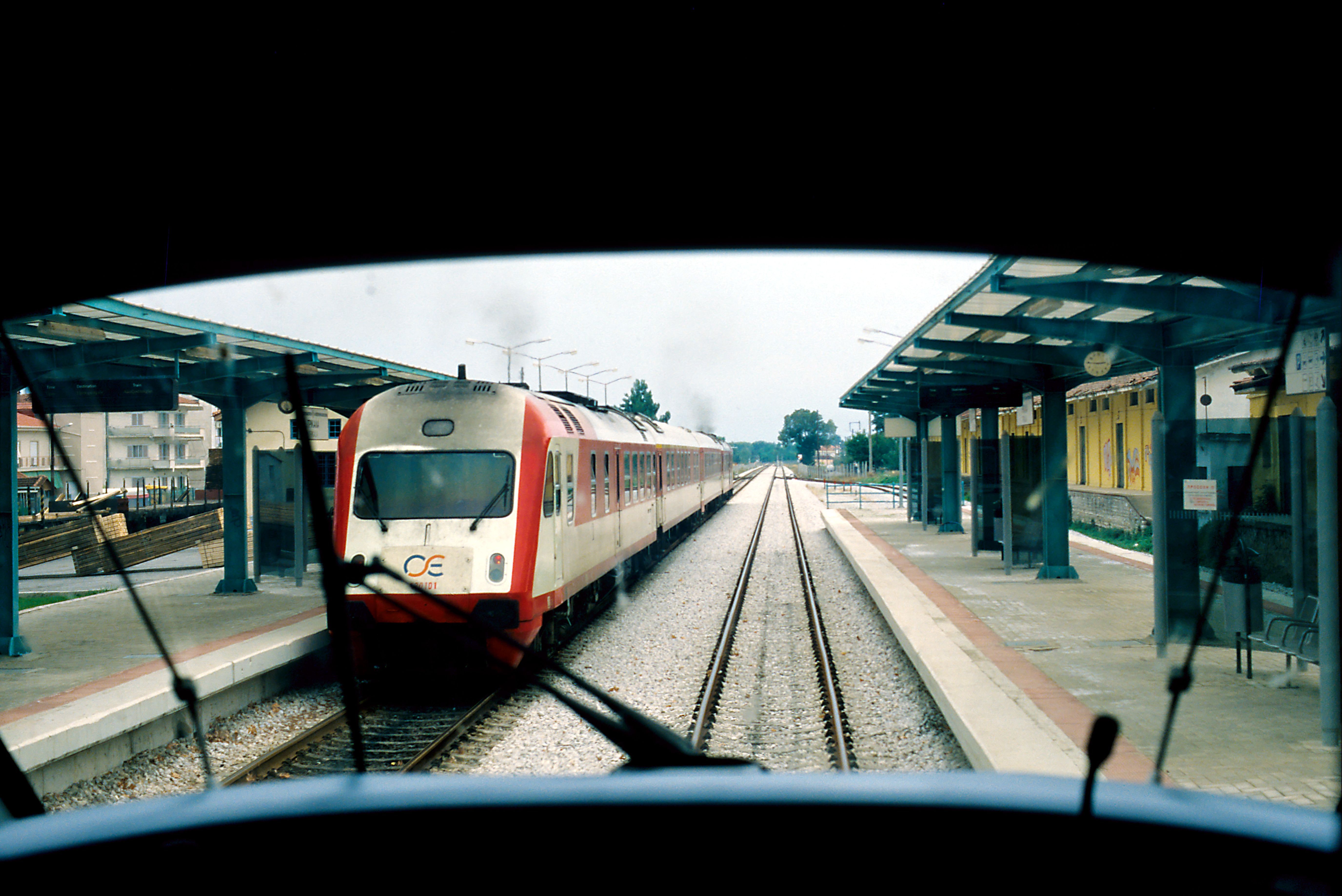 Zugkreuzung zwischen Paläofarsalos und Kalambaka. Nach der Umspurung wurden durchgehende Züge von und nach Athen möglich und auch für einige Jahre gefahren. Der Triebzug der BR 520 ist ein solcher.